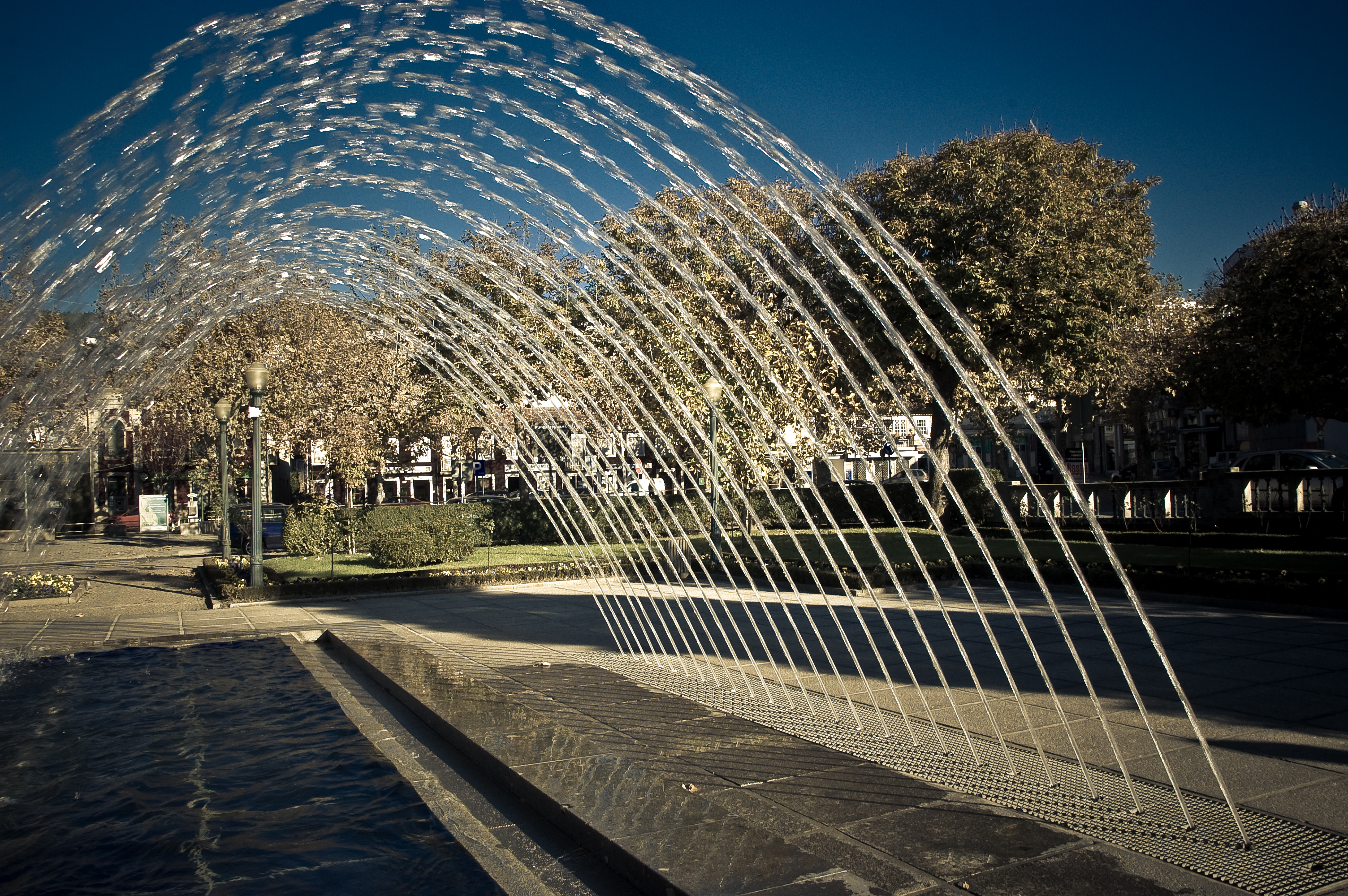 Vizela